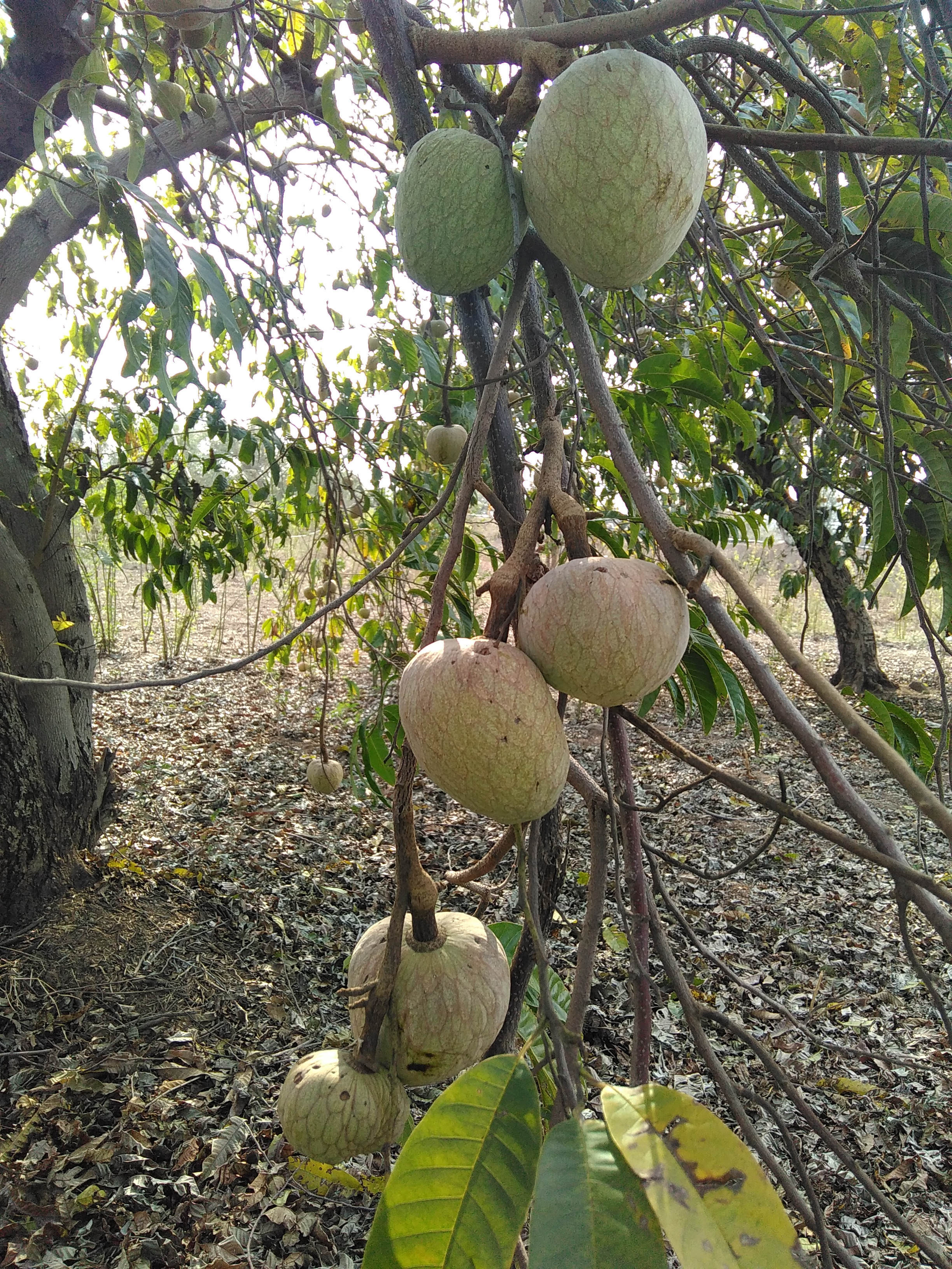 महाराष्ट्रातील गोदरी (ता. चिखली, जि. बुलढाणा) गावातील रामफळ